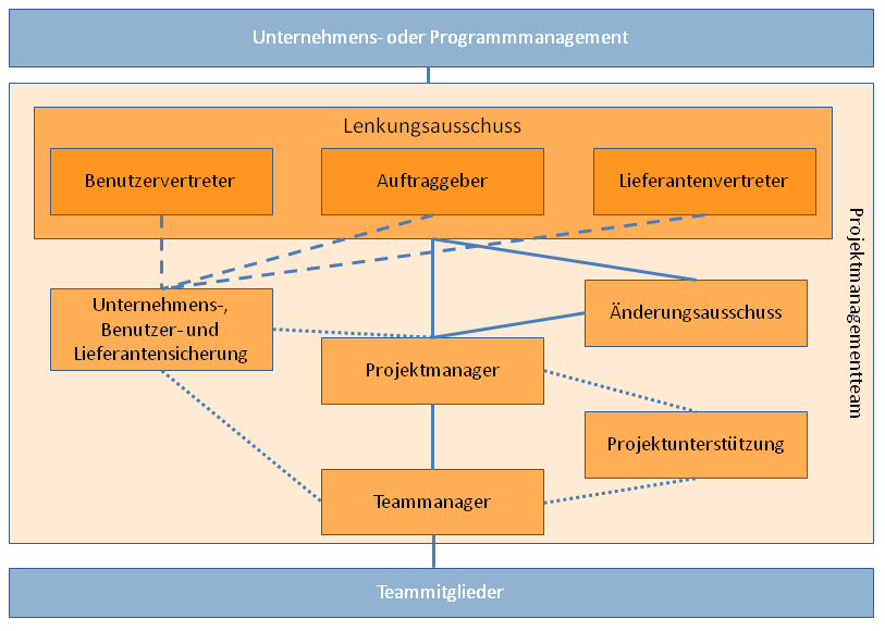 Die Rollen in einem PRINCE2-Projektmanagementteam (PRINCE2 2009)